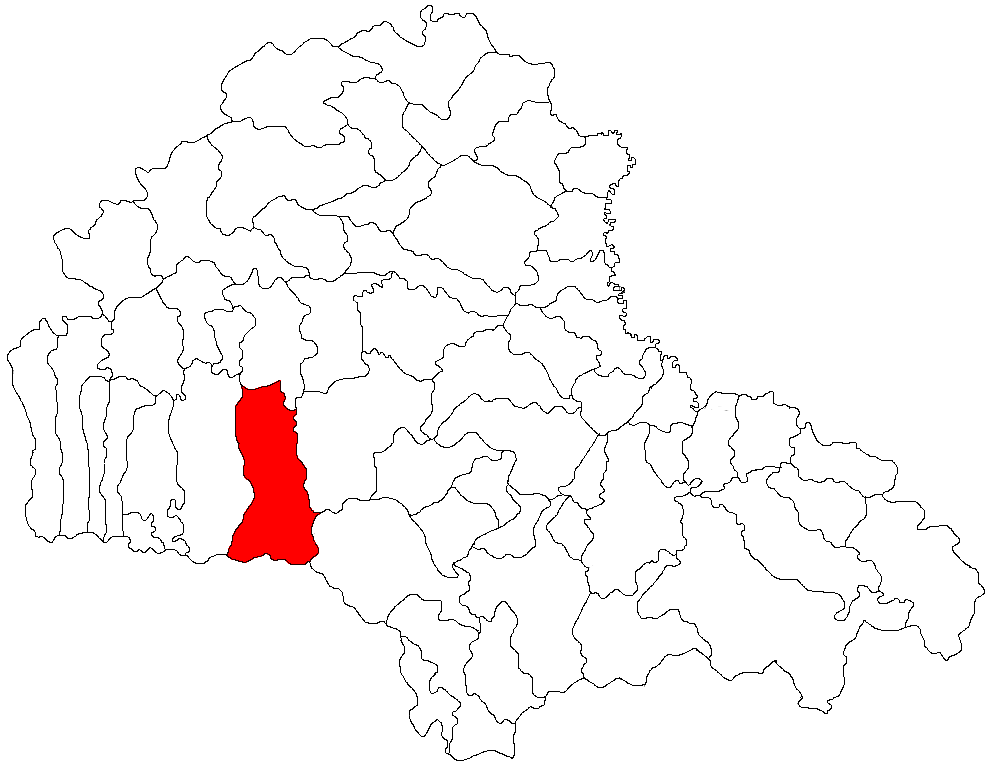 Categorie:Hărţi ale judeţului Braşov